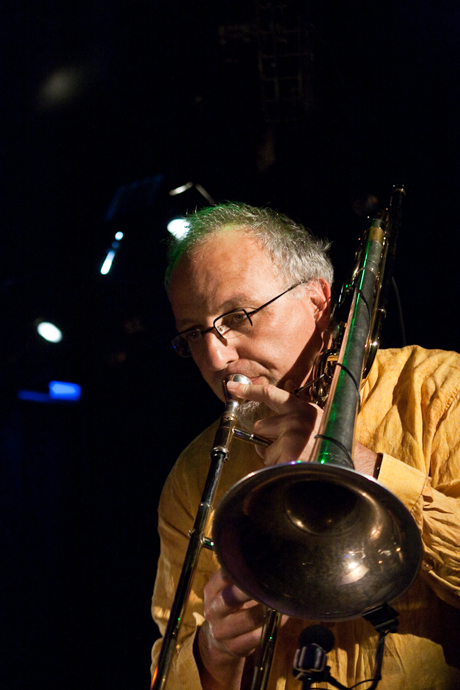 Yves Robert en concert au Triton (Les Lilas, 93) lors de la création du projet "l'argent nous est cher" avec entre autres la chanteuse Elise Caron. Le 25 septembre 2009.